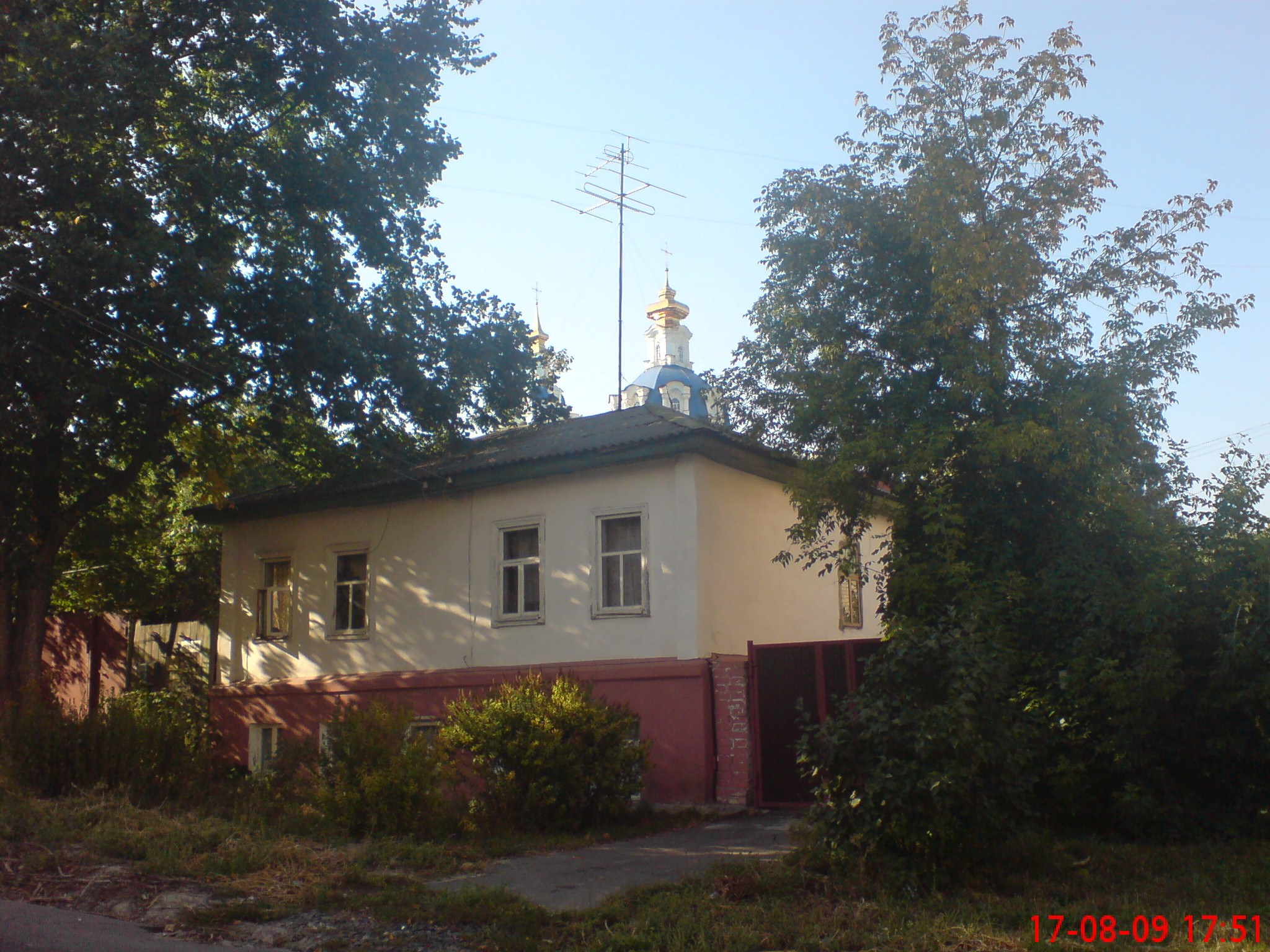 Дом номер №16 по улице Уфимцева (Первышевской). Координаты: [1]